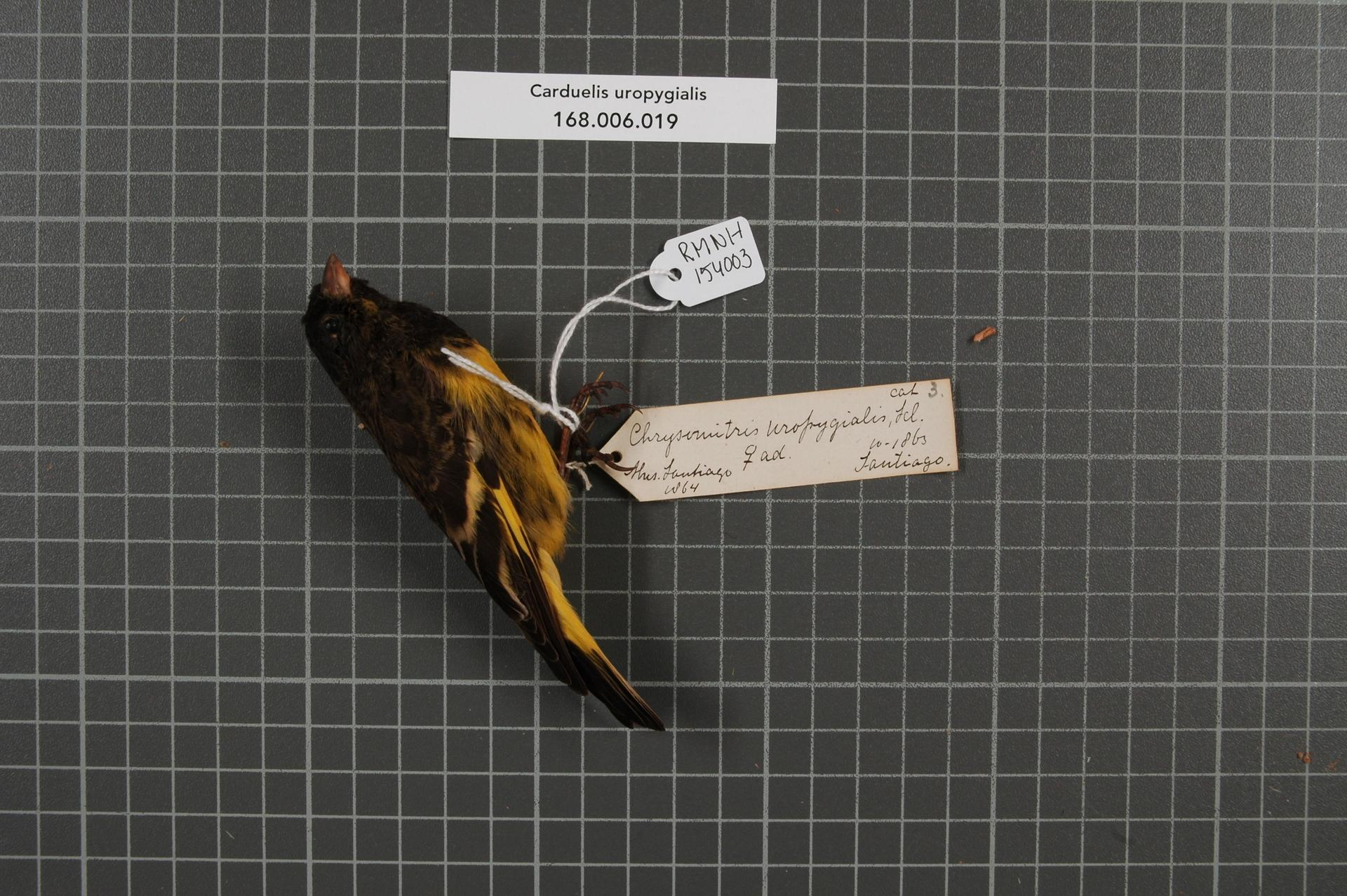 Carduelis uropygialis (P.L. Sclater, 1862)